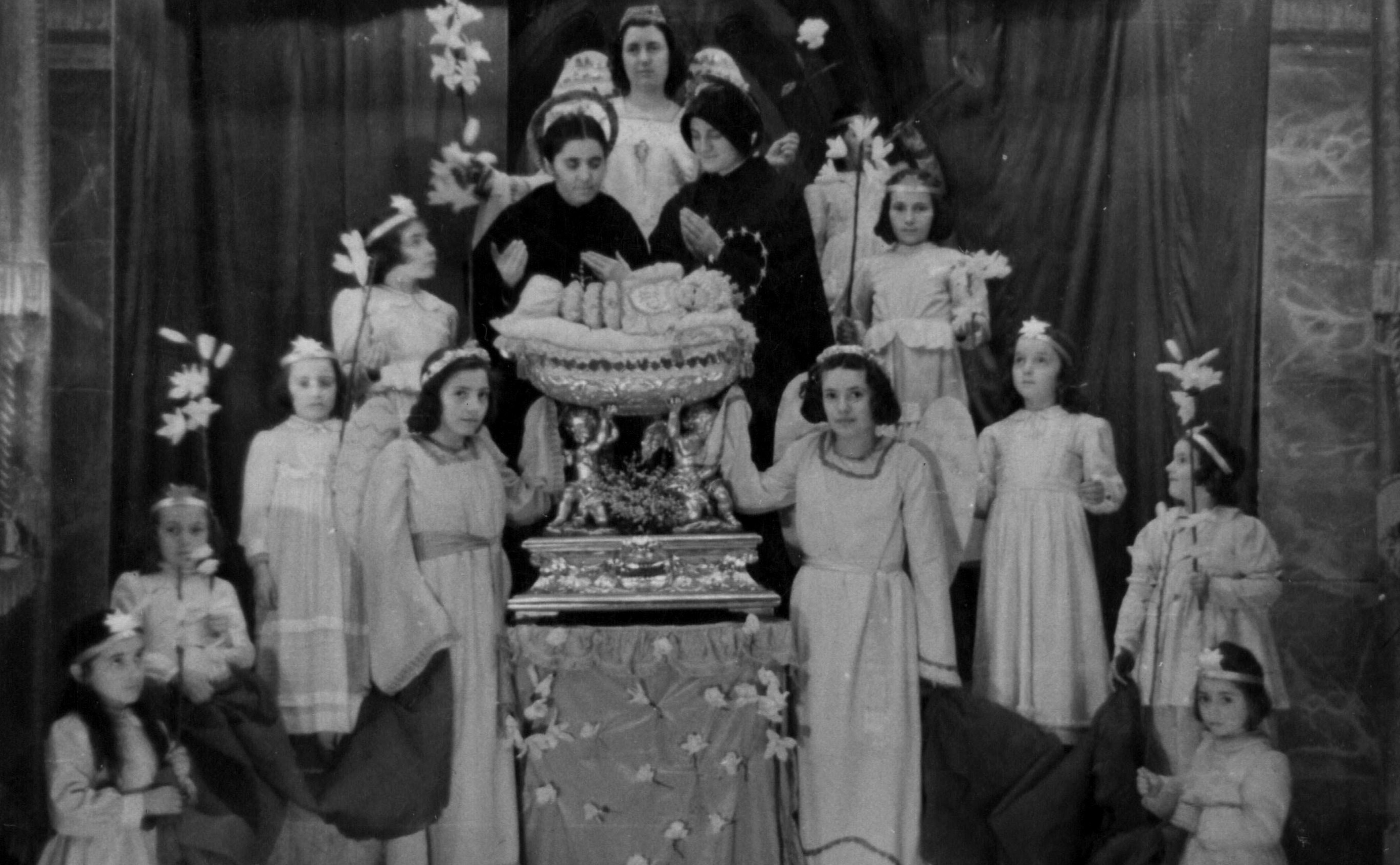 Spettacolo della filodrammatica femminile al teatro dell’oratorio di San Fruttuoso di via Marelli nel 1951; commedia “Le Sante di Lovere”, Santa Gerosa e Santa Capitanio, fondatrici delle Suore di Maria Bambina.